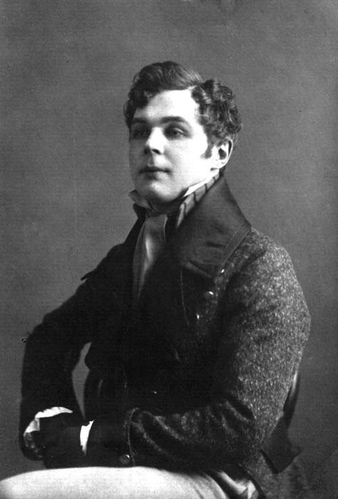 С. Л. Кузнецов в роли Хлестакова ("Ревизор" Н. В. Гоголя)